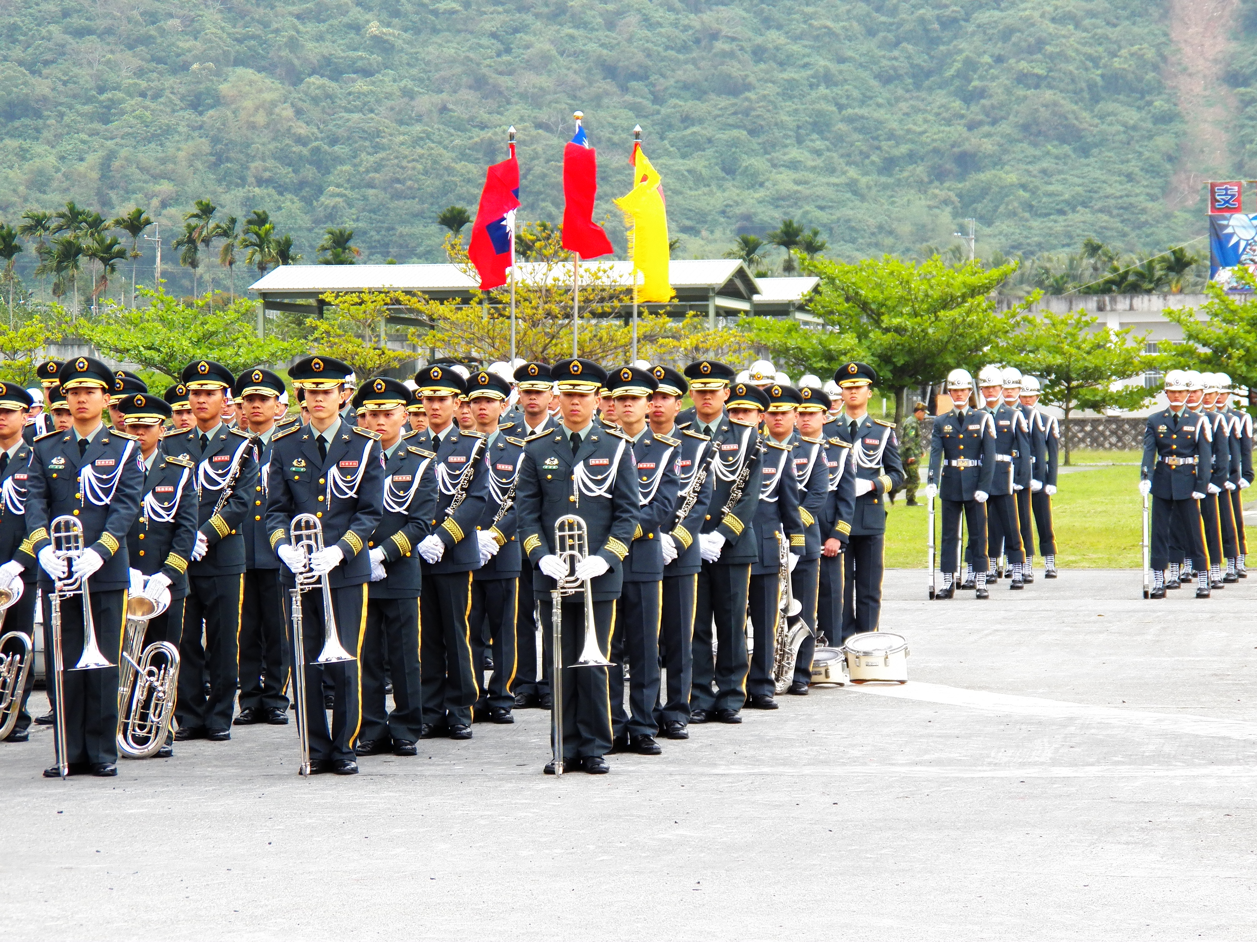 2012年陸軍臺東地區防衛司令部太平營區開放活動，開場合唱表演中待命的陸軍樂隊（前）與陸軍儀隊（後）。